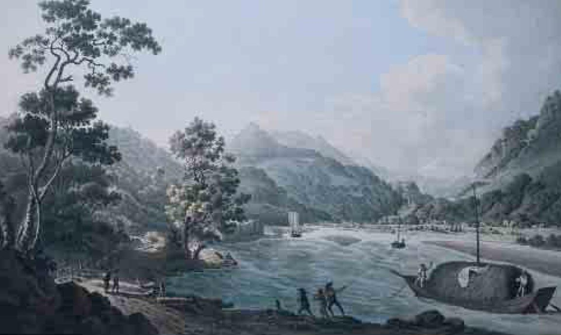 La Linth en amont de Ziegelbrücke en 1796, élévation du niveau de la rivière avec les travaux de correction.